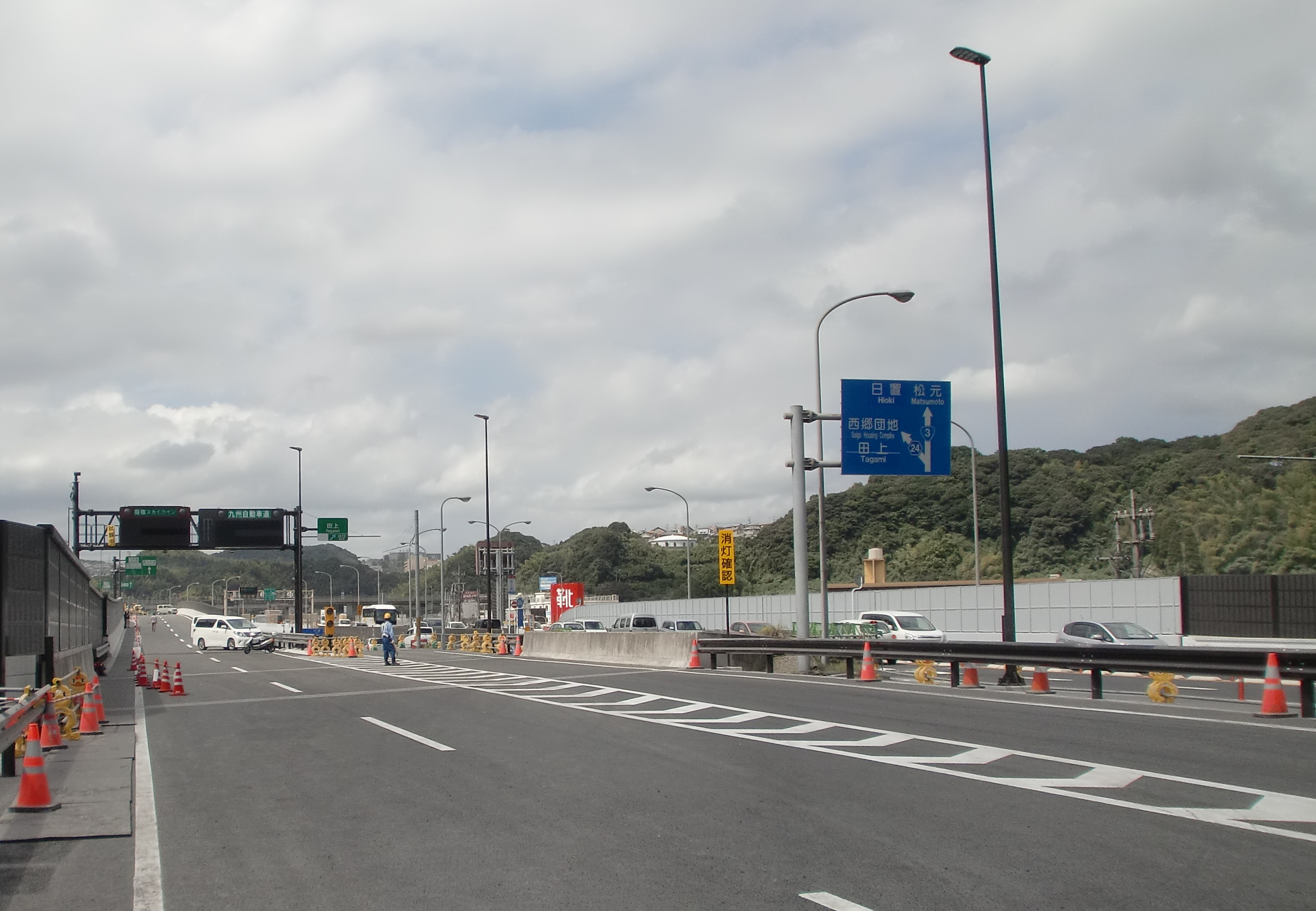 開通前の鹿児島東西幹線道路本線と田上IC出口（右側出口）